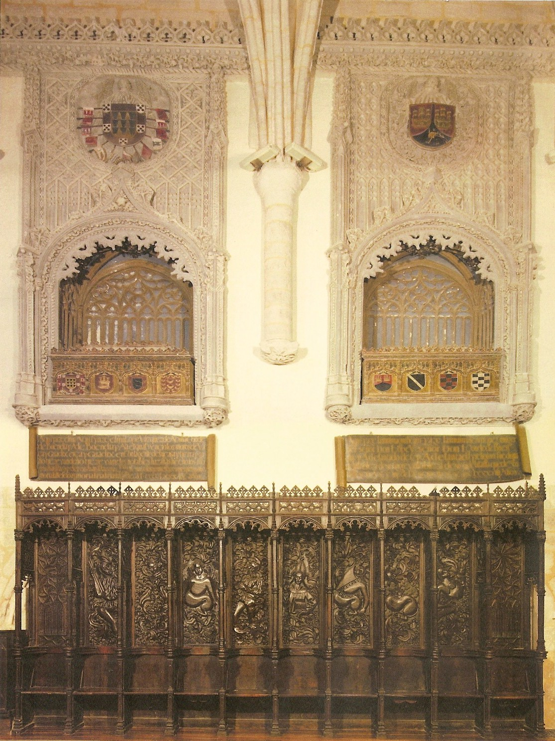 A la izquierda de la imagen aparece el sepulcro de Lope Vázquez de Acuña, segundo conde de Buendía y fallecido en 1489. Y a la derecha aparece el sepulcro de su esposa, Inés Enríquez de Quiñones, fallecida en 1488 y tataranieta por parte paterna del rey Alfonso XI de Castilla. Se encuentra en el lado de la Epístola de la capilla mayor de la iglesia de Ntra. Sra. de la Asunción de Dueñas, provincia dePalencia, (España).